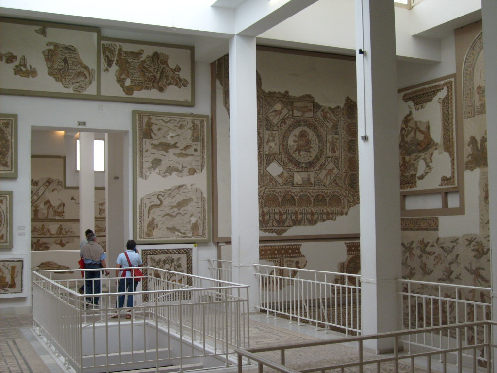 Salle du département de mosaïques romaines du Musée national du Bardo (Tunisie)